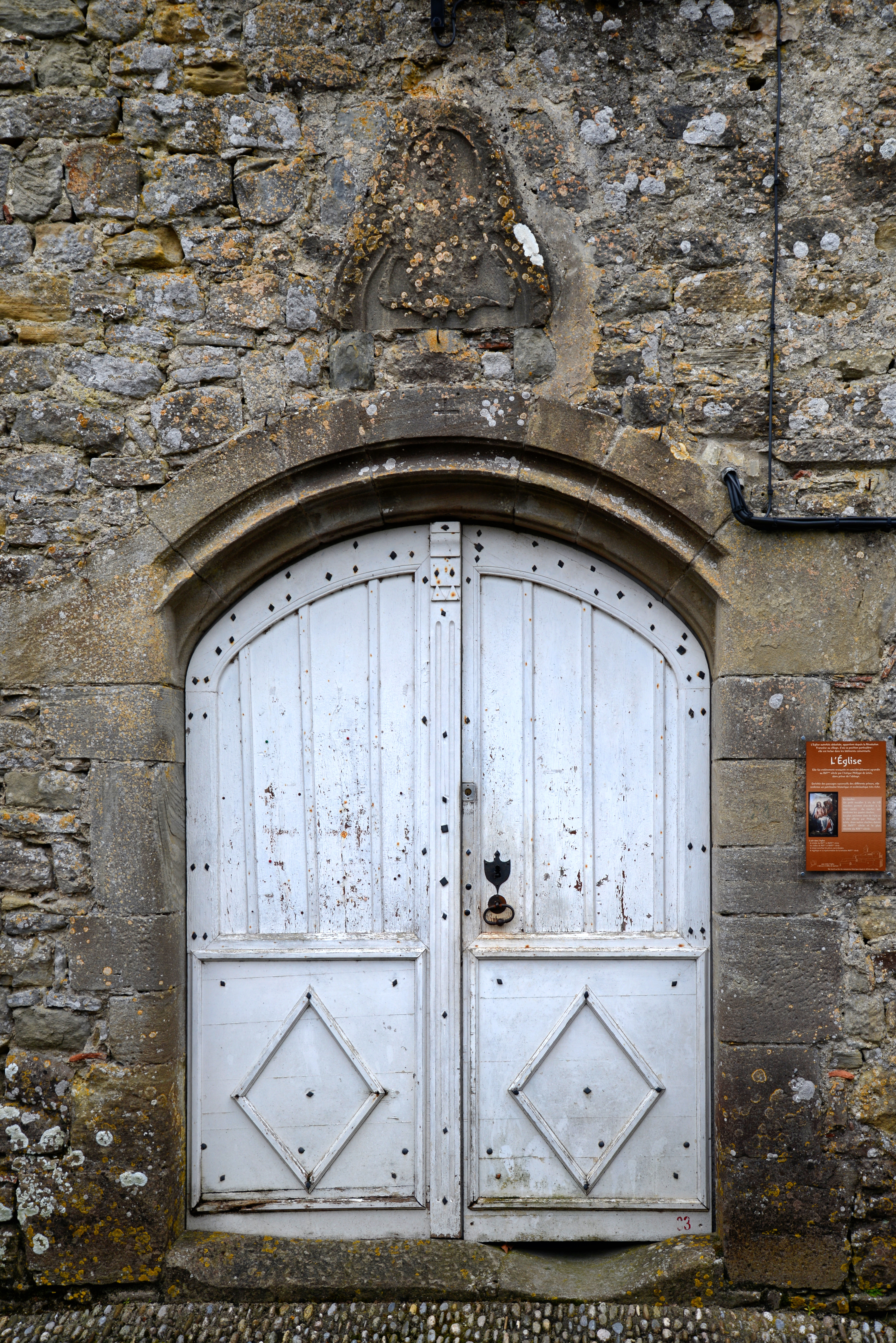 Camon, Ariège (Midi-Pyrénées) - Porte de l'église de l'ancienne abbatiale de la Nativité de la Vierge